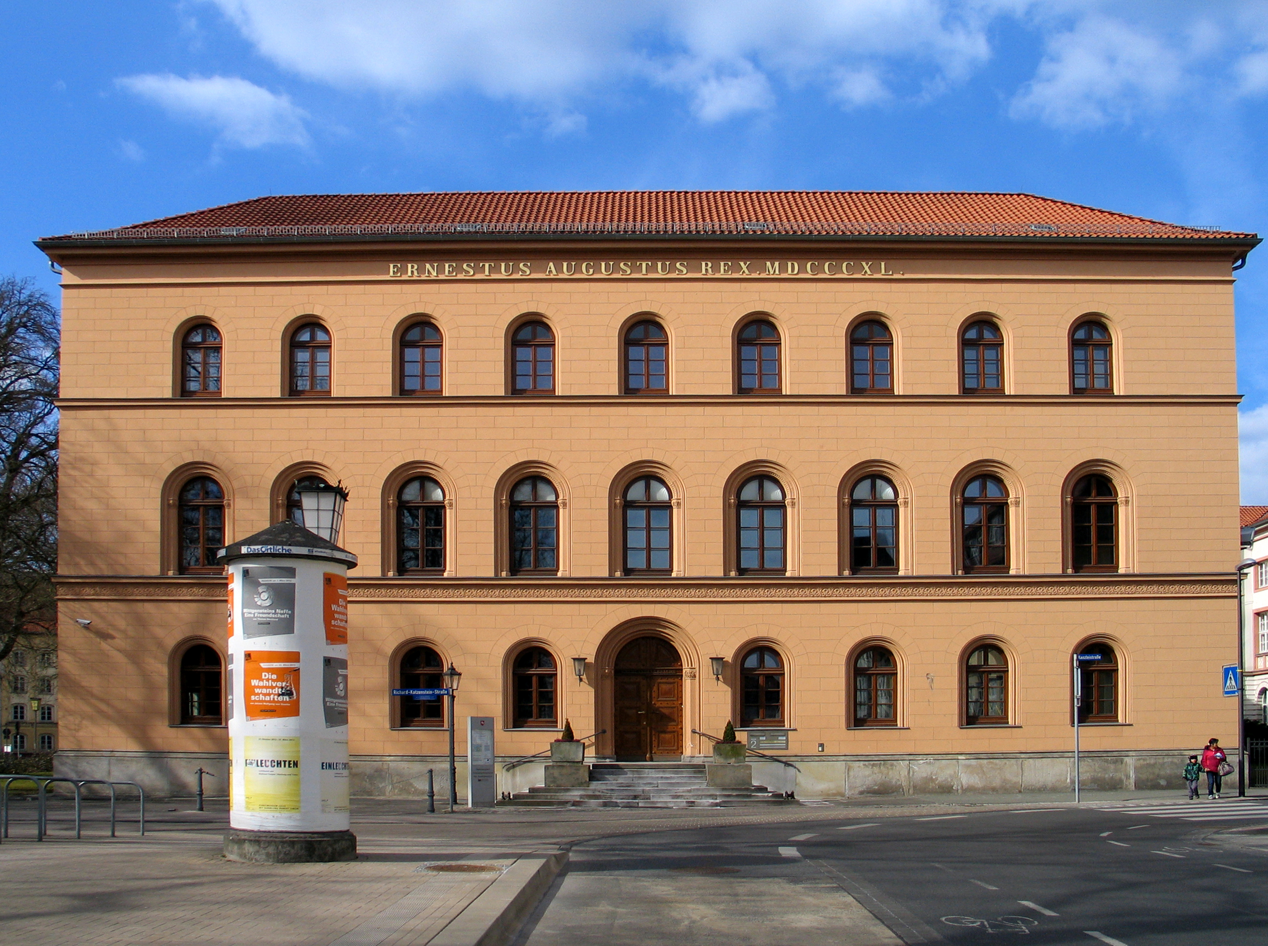 Blick vom Celler Schlossplatz auf die Hauptfassade des 1840 unter König Ernst August errichteten Oberlandesgerichts Celle ...